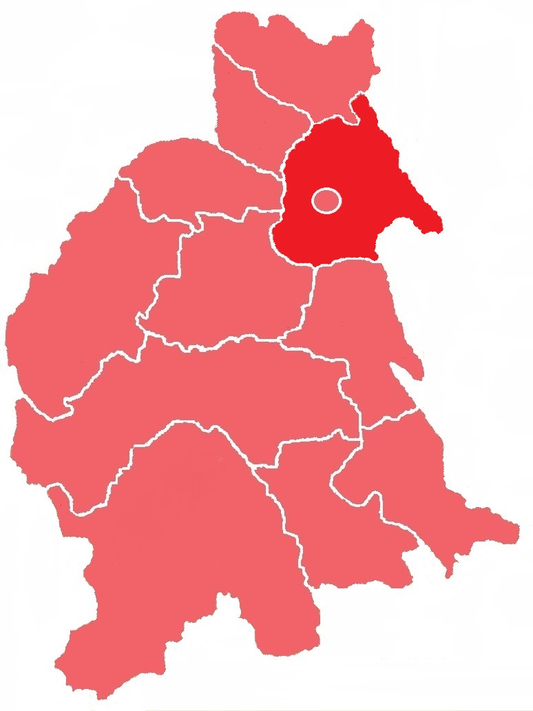 Чернівецький повіт